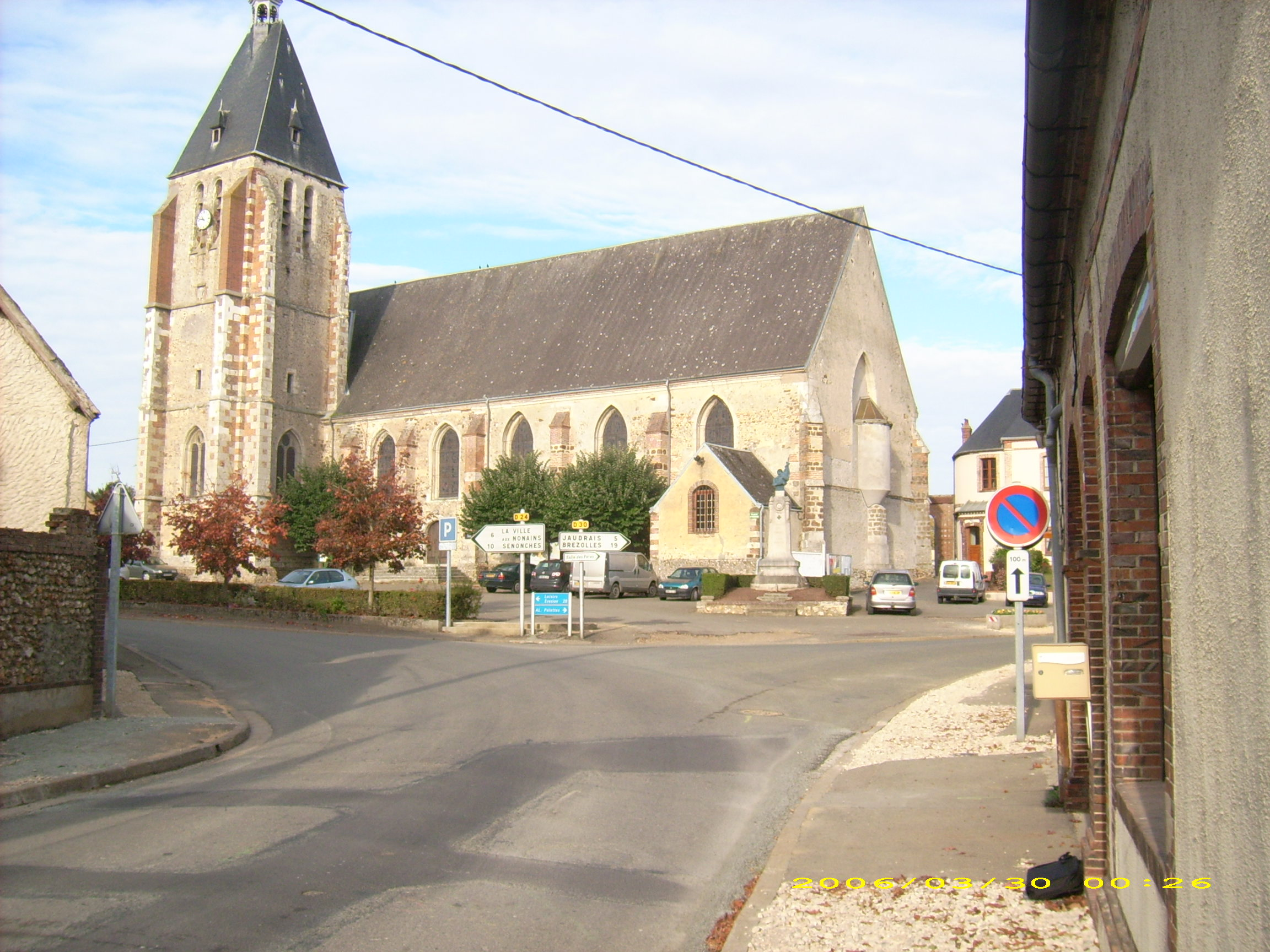 Eglise de Digny